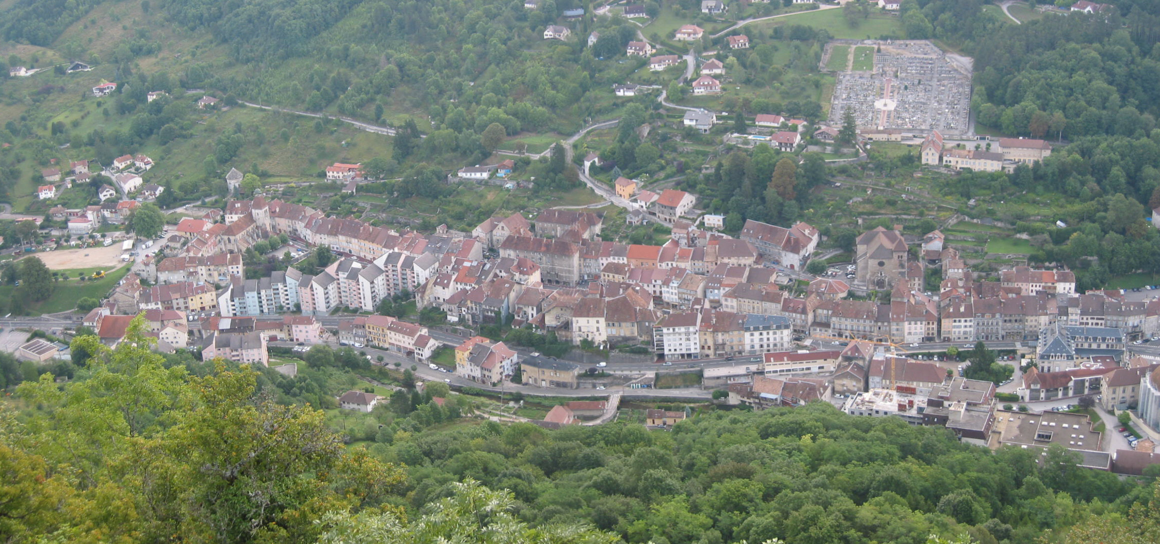 Salins-les-Bains (39), Tor der Saline